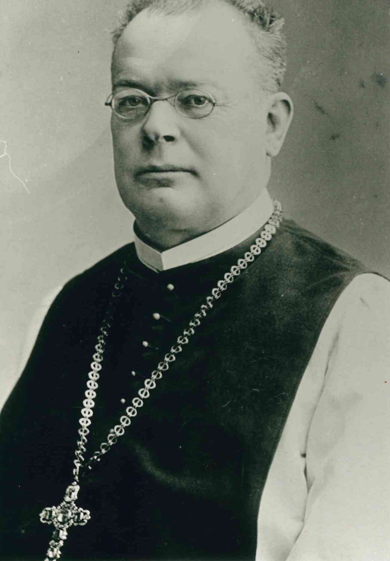 Bauer war Abt von Stift Rein (Steiermark) 1900-1909